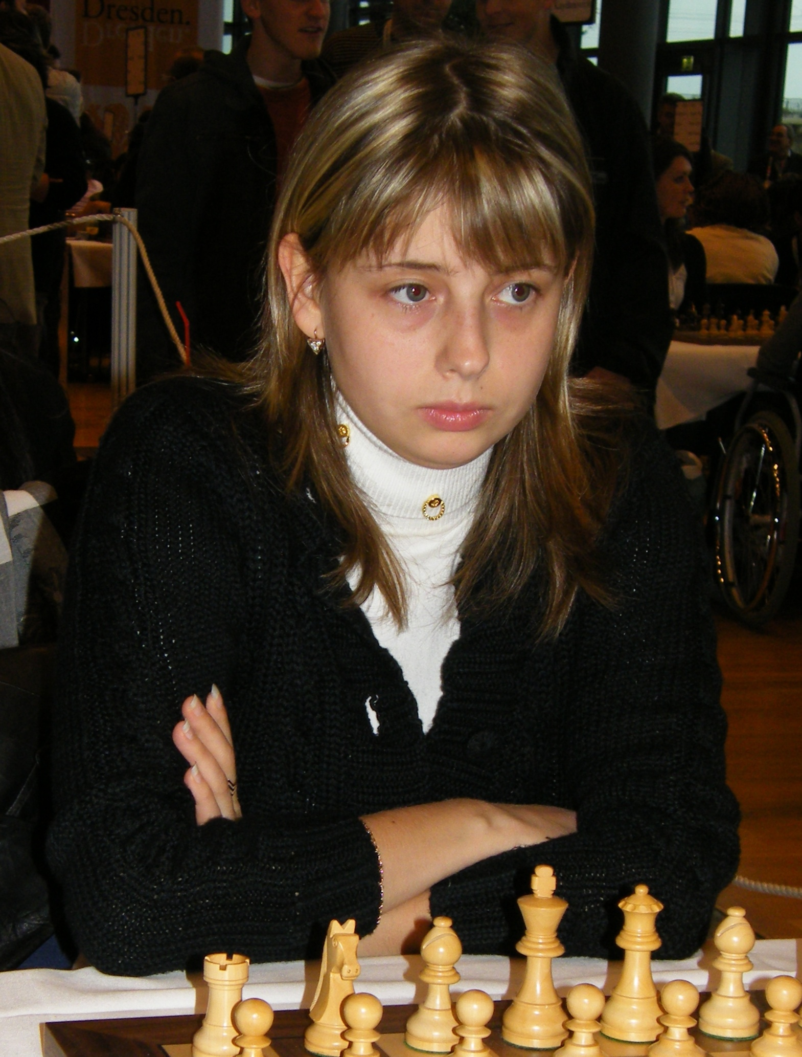 Natalja Zdebskaja bei der 38. Schacholympiade in Dresden 2008